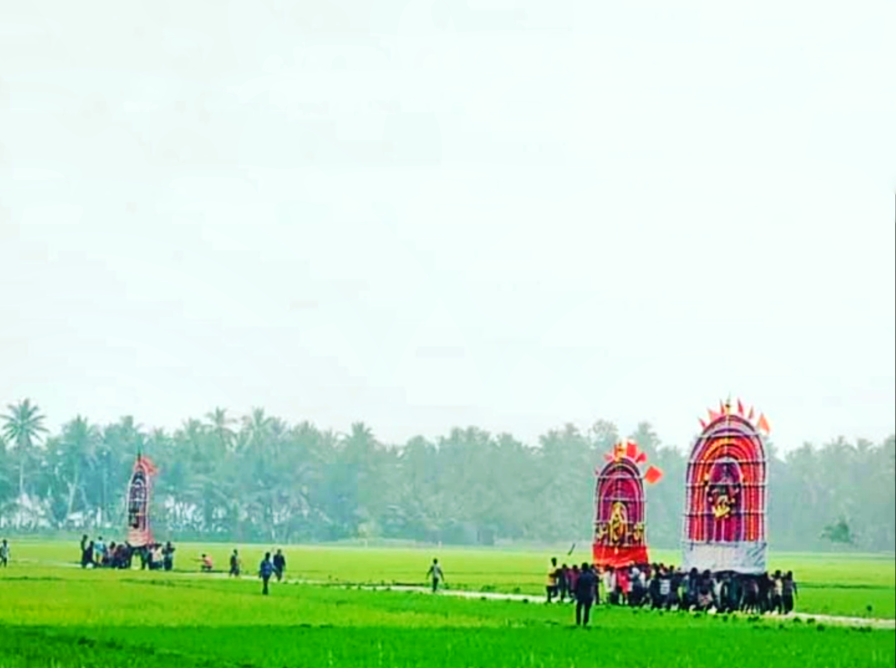 పొలాల మధ్య ప్రభలు తీసుకొస్తున్నా దృశ్యం